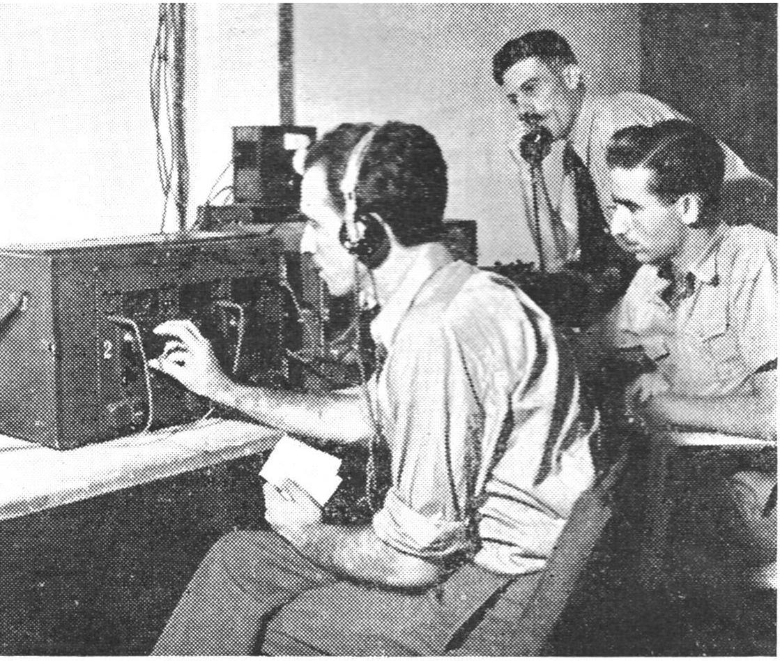 חדר הפיקוח בבניין שרות השידור בירושלים. פורסם בחוברת "הגלגל" בתאריך 16.9.1943.